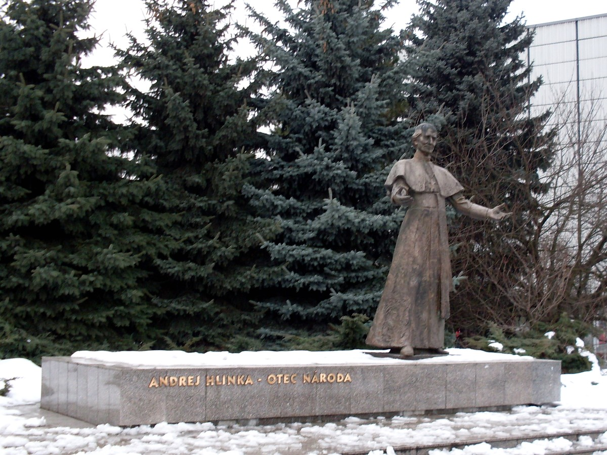 Fotky z mesta Žilina